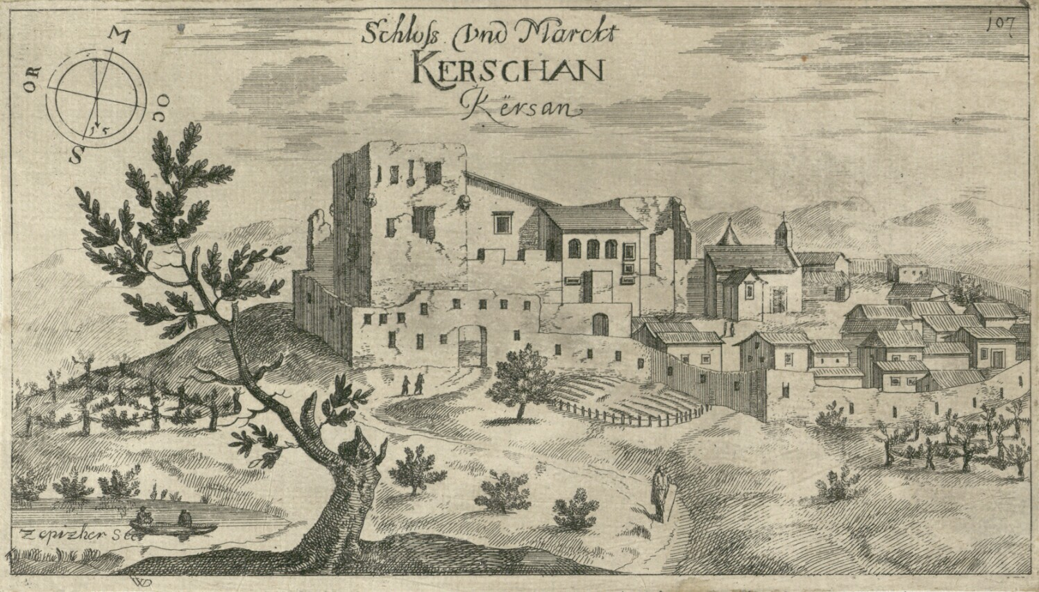 Kršan